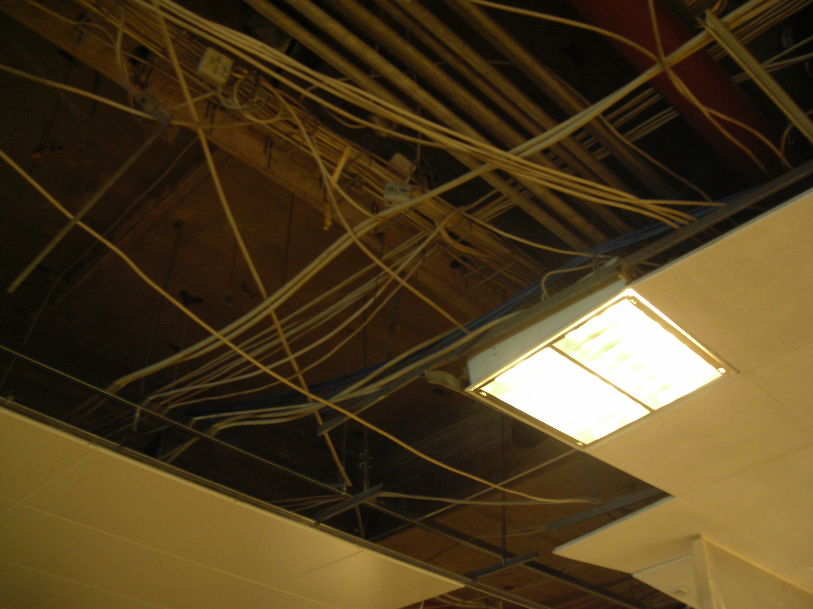 Abgehängte Decke (Hertie am Bahnhofplatz.